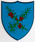 Wappen von Les Hauts-Geneveys Kanton Neuenburg Schweiz